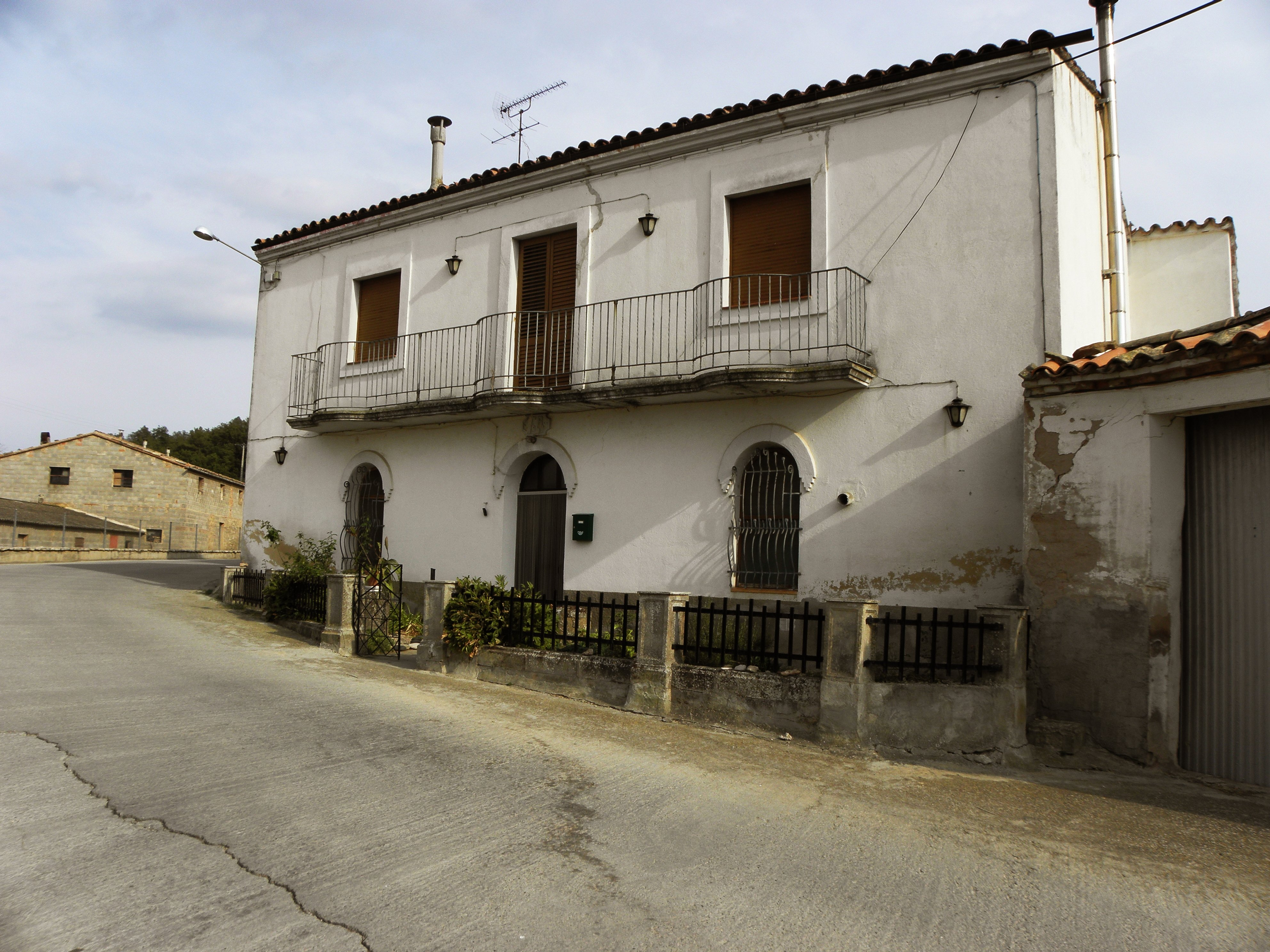 Enfesta (La Molsosa, Solsonès). La casa de l'entrada del poble (1942)